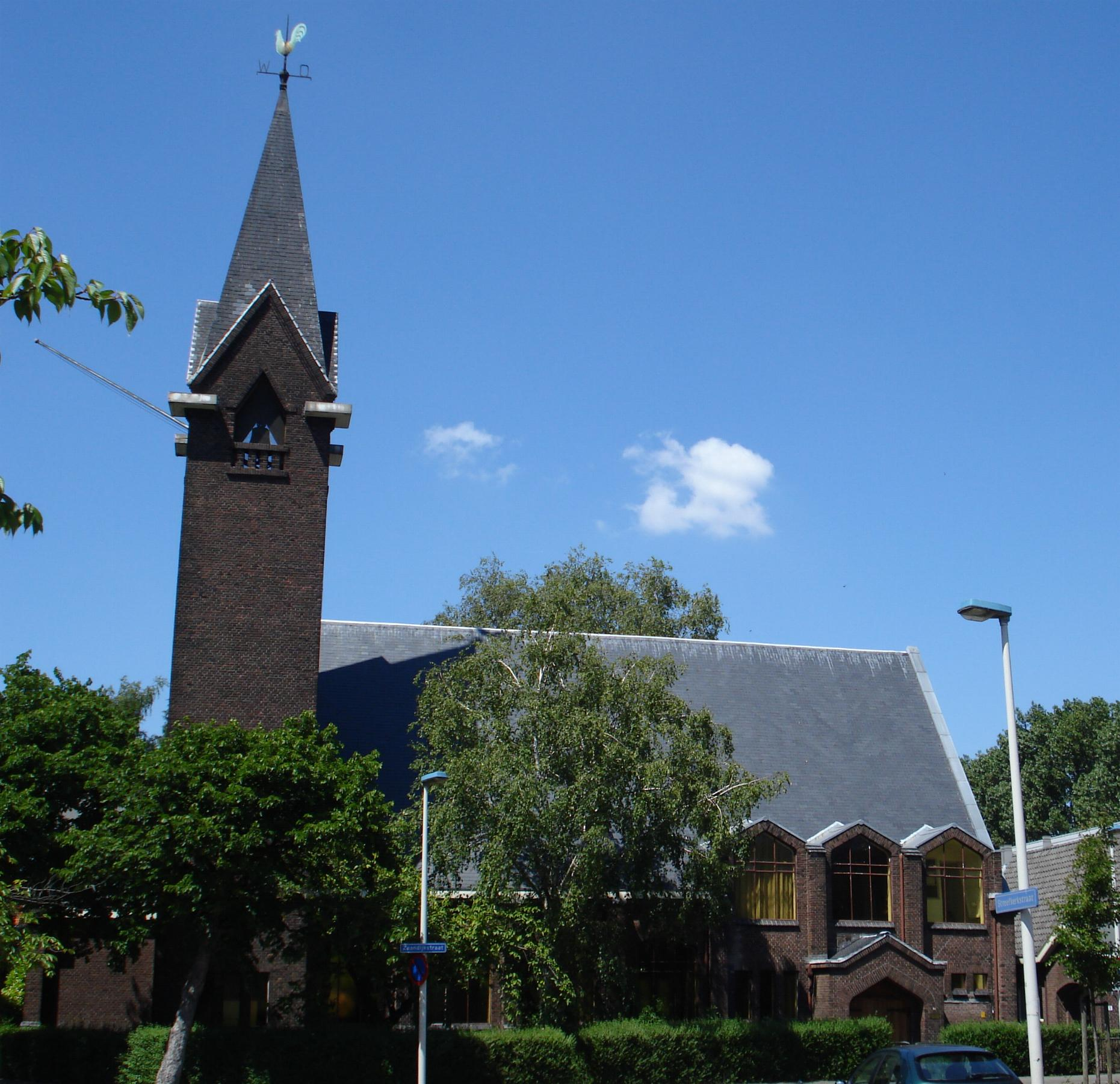 Rotterdam, Heijplaat, Julianakerk. Het gebouw werd in de nacht van 6/7 augustus 2017 door brand verwoest.